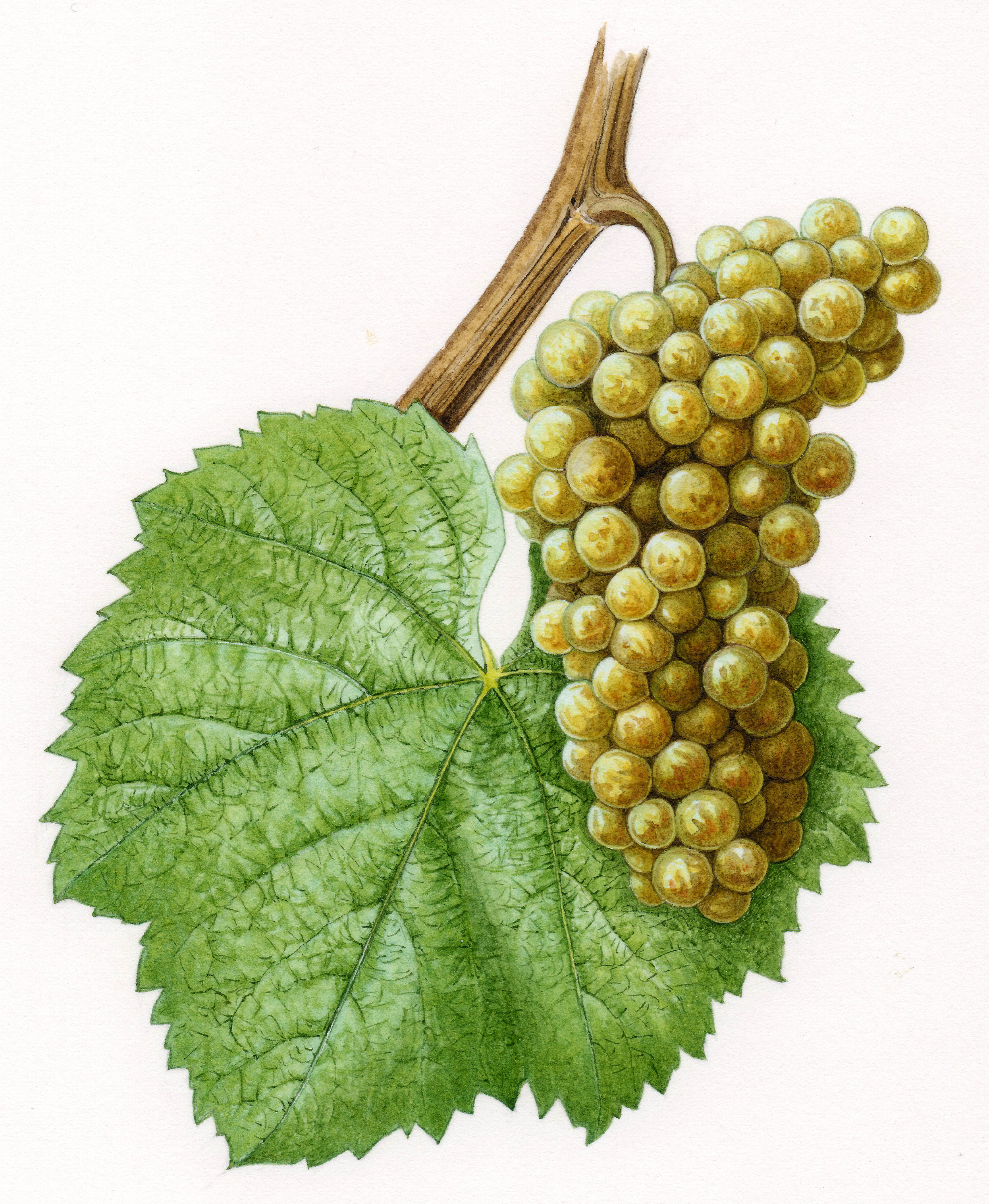 Aquarelle originale pour les Cépages de France (2001)